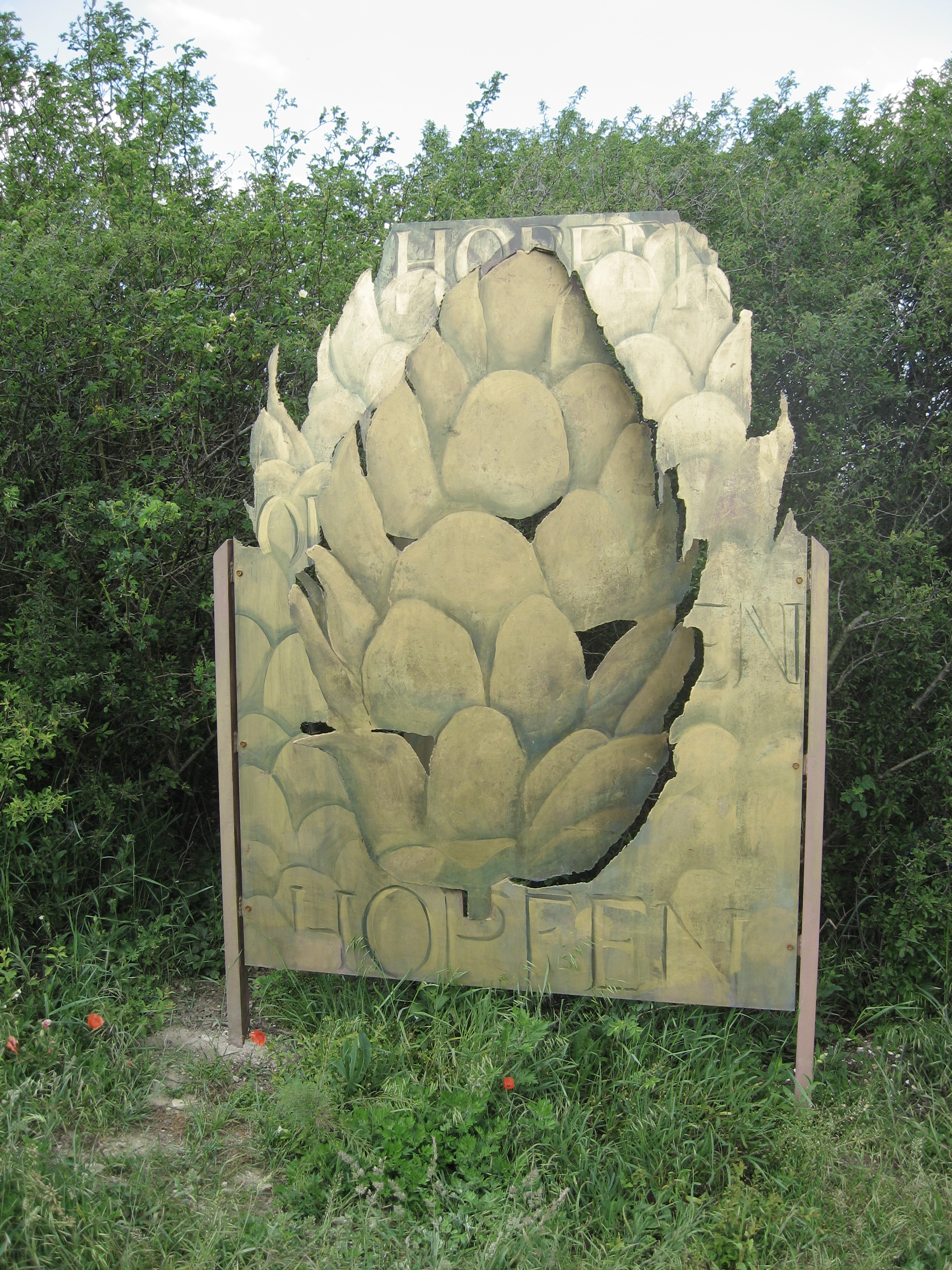 Riesenhopfenstange am Erlebnisweg in Arnstadt